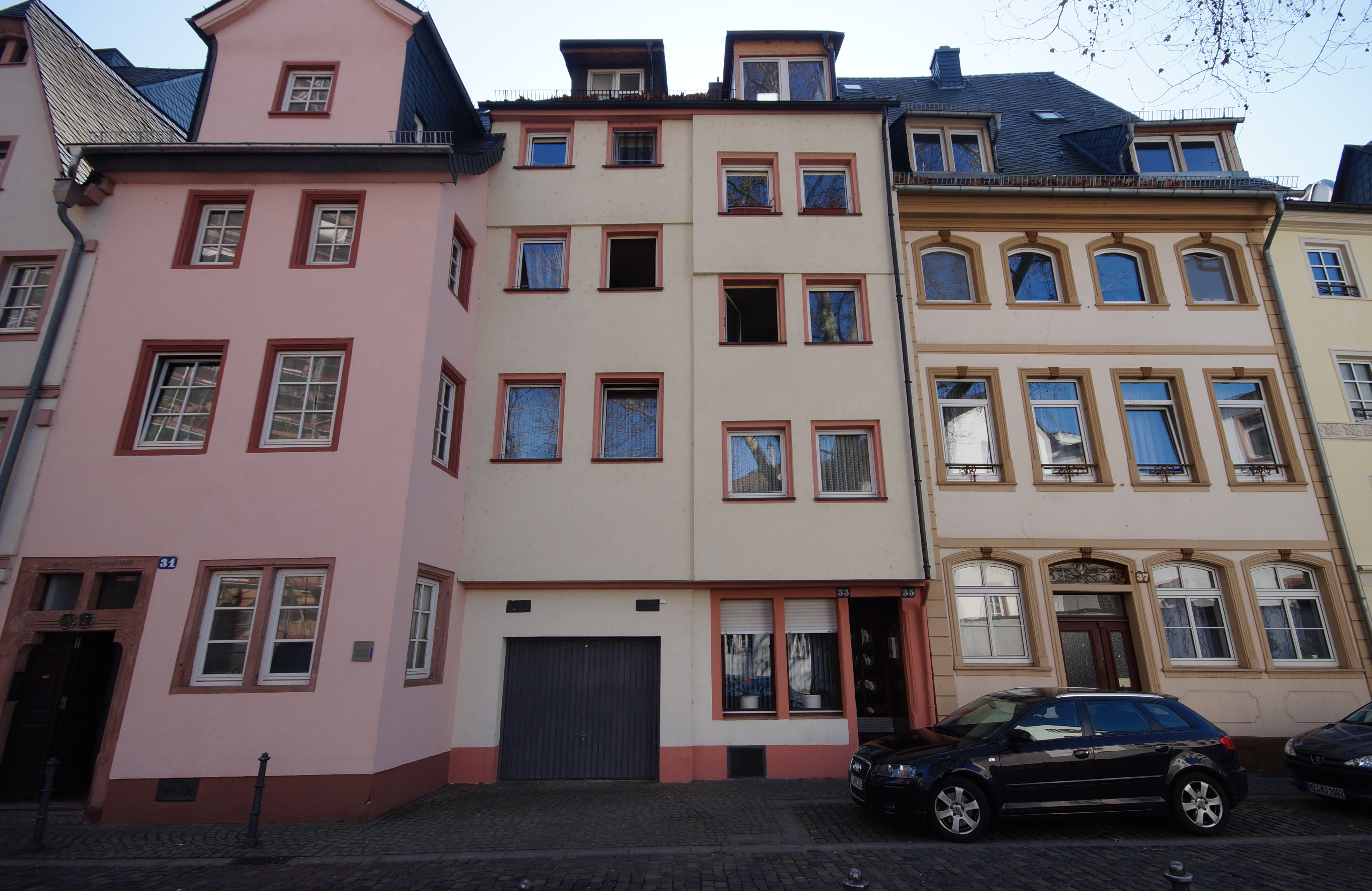 Die Fassaden der Gebäude Kapuzinerstraße 33 und 35 in Mainz-Altstadt